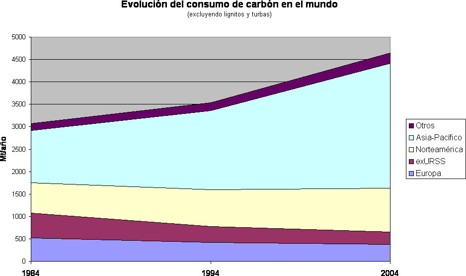 Consumo de carbón en el mundo, por región (1984 - 2004) / World coal consumption, by region (1984 - 2004)